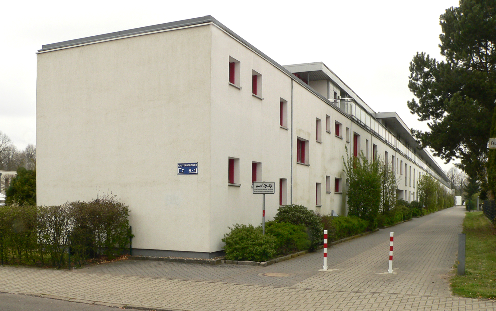 Siedlung Blumläger Feld in Celle